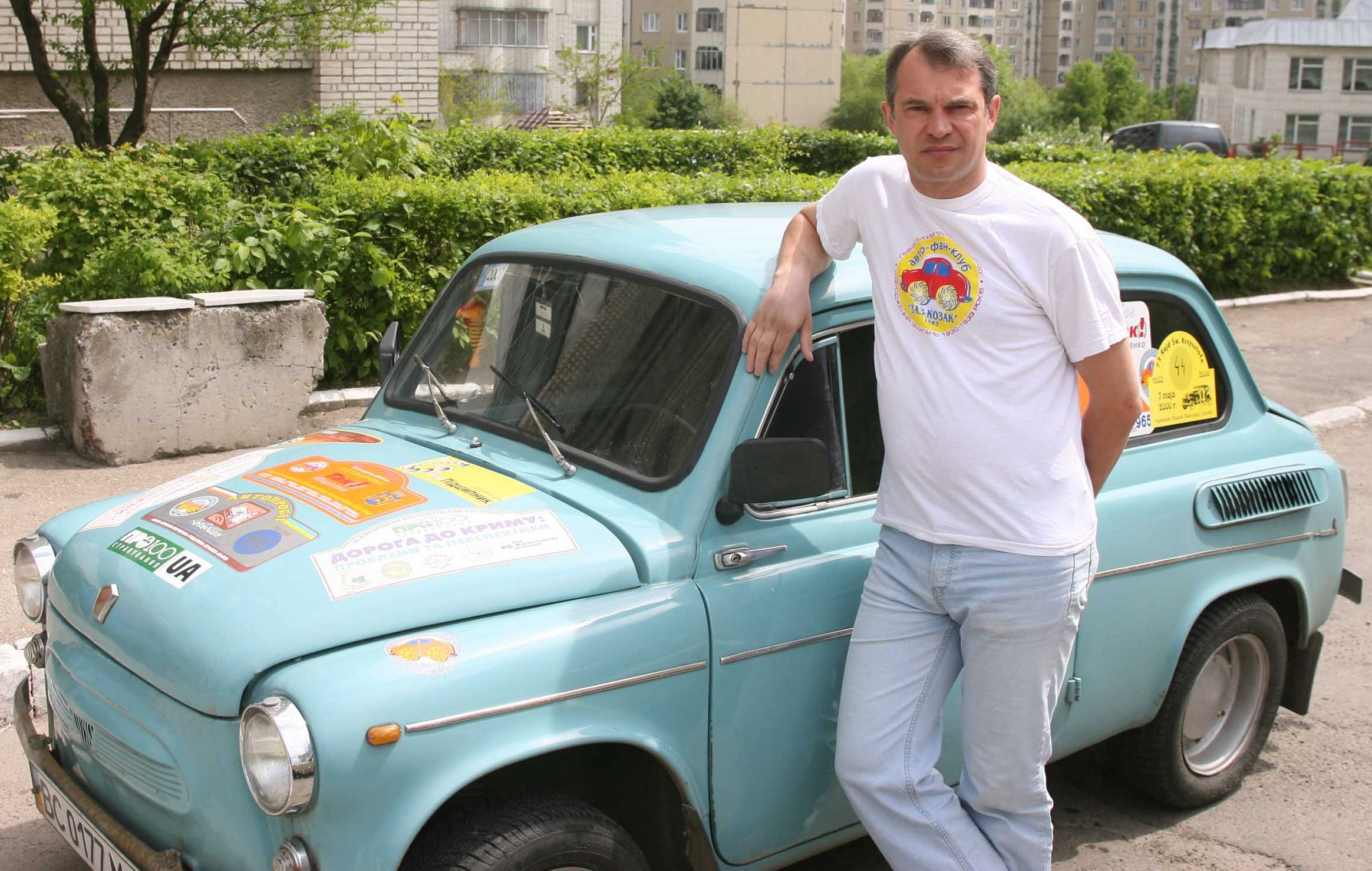 Євгеній Кравс — український фотокореспондент і екс-президент Авто-фан-клубу «горбатих» запорожців «ЗАЗ-Козак